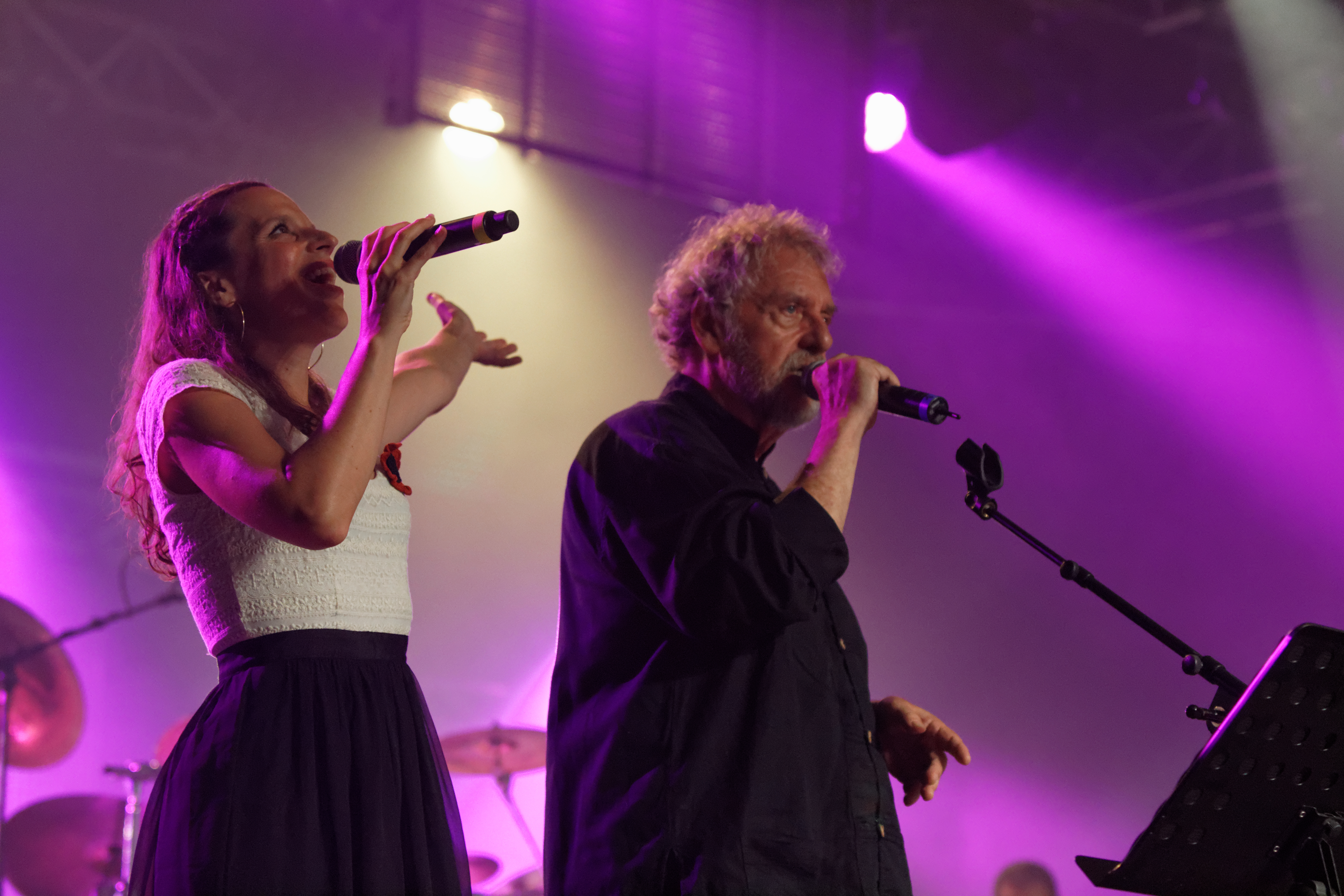 Dan Ar Braz et le bagad Kemper en concert à l'espace Gradlon lors du festival de Cornouaille 2013, à l’occasion des 90 ans du Cornouaille et des 20 ans de la création de l’Héritage des Celtes.